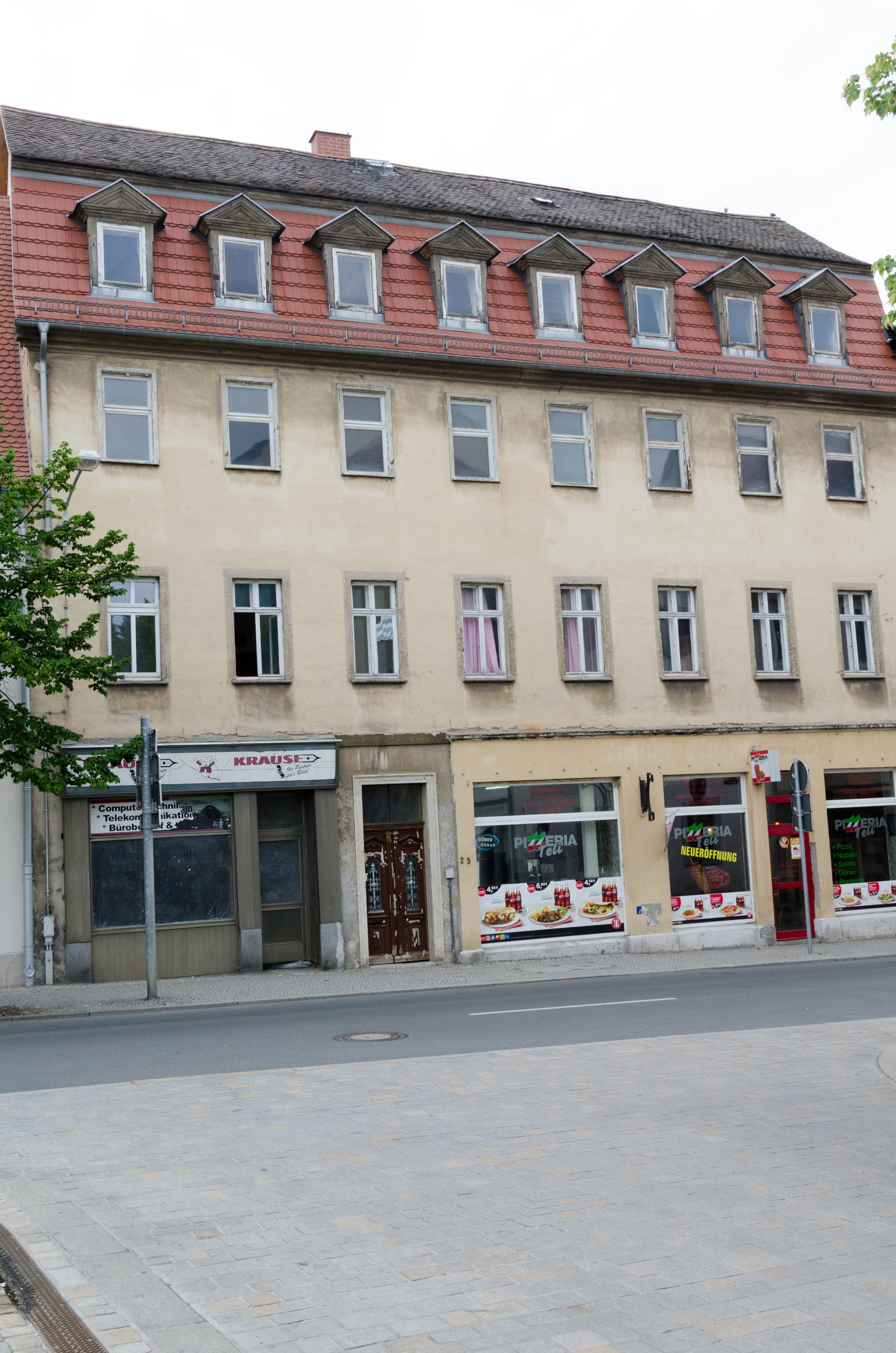 Zeitz, Altmarkt 23